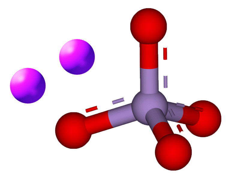 Potassium Manganate 3D Molecule, K2MnO4